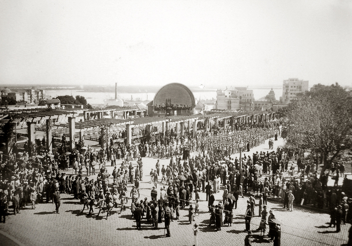 Banda Municipal de Porto Alegre em desfile defronte ao Palácio Piratini. Primeira metade do século XX. À esquerda, além da pérgola, estão as arquibancadas do antigo Auditório Araújo Viana e sua famosa concha acústica no centro da imagem. Museu Joaquim Felizardo, Porto Alegre.